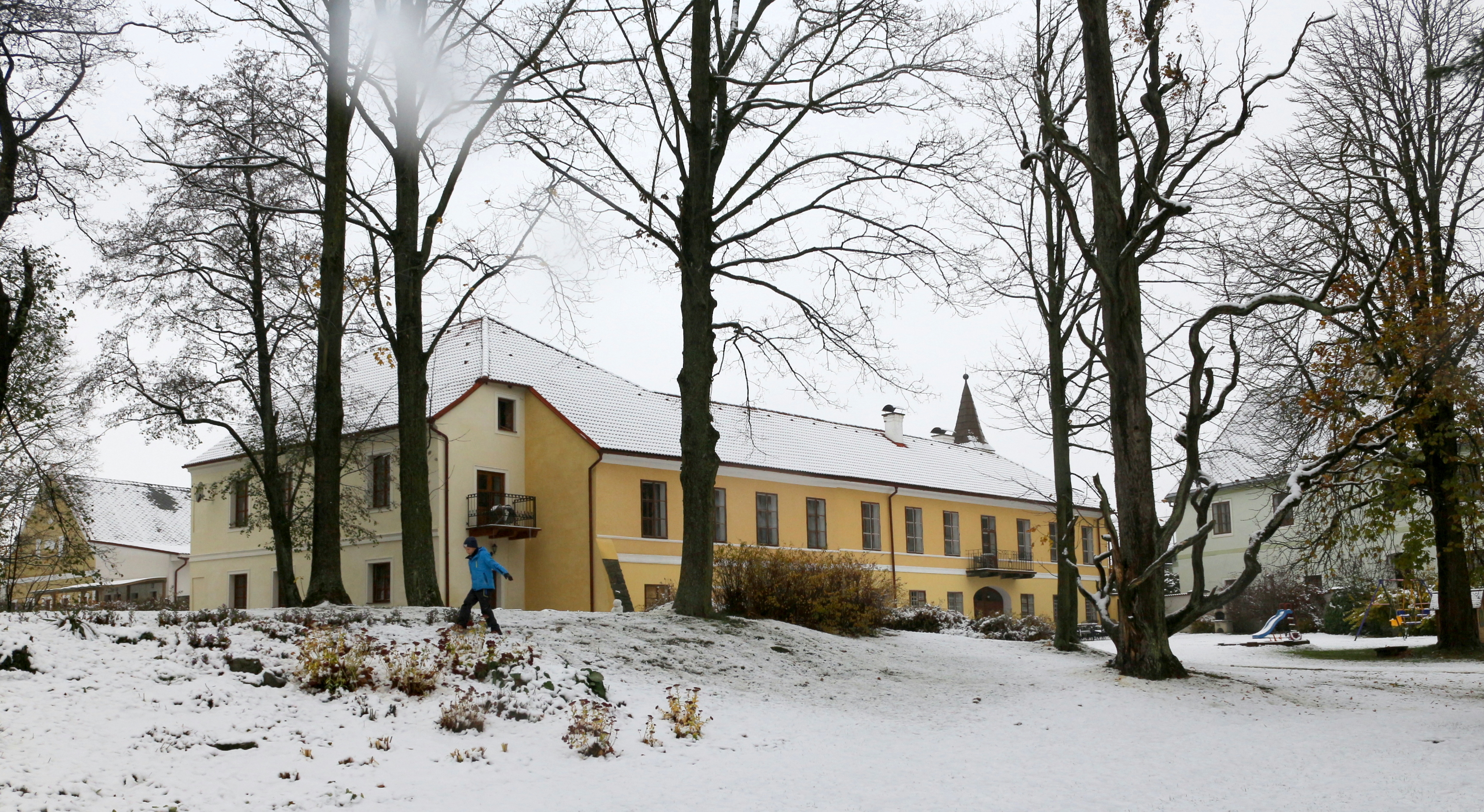 Jindřichovický zámek